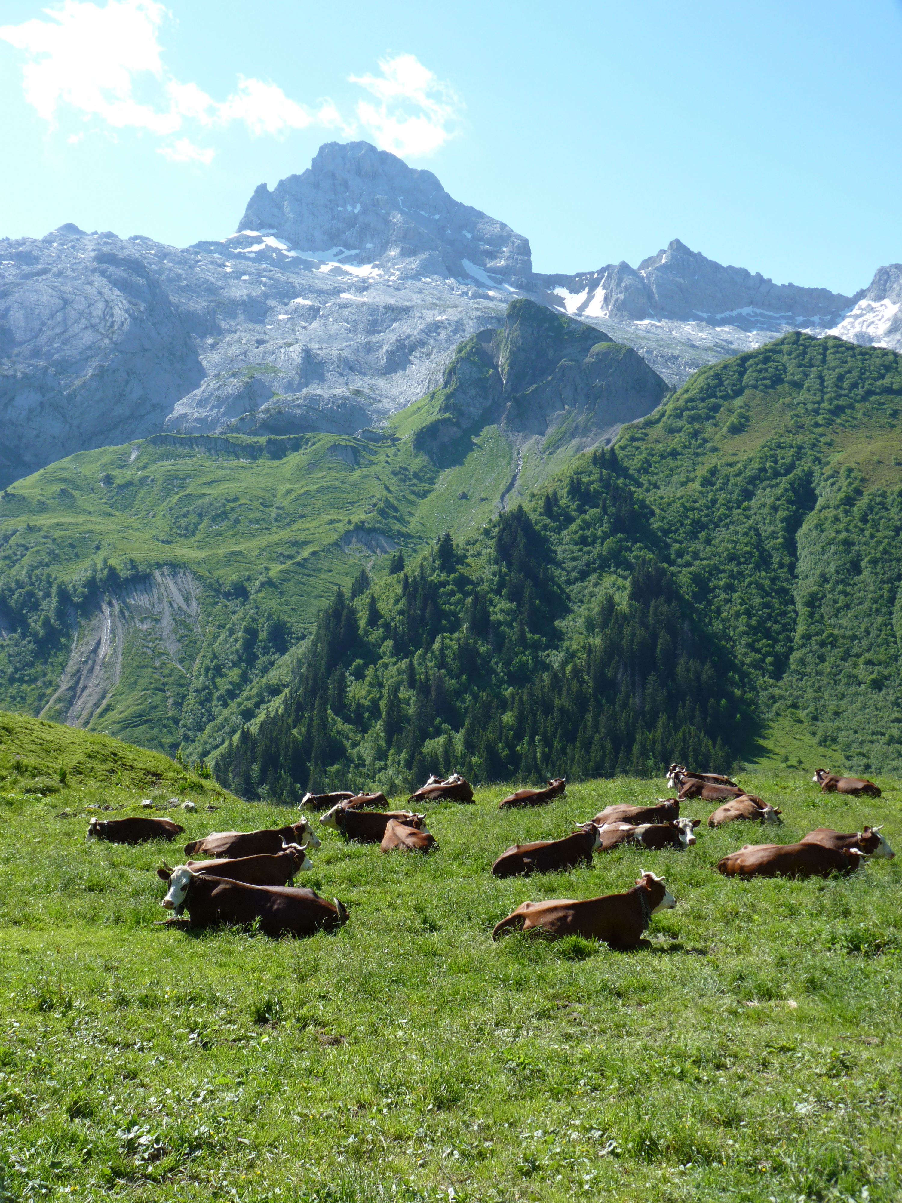 Dans la chaîne des Aravis, la Pointe Percée (2 752 m), depuis le col des Annes